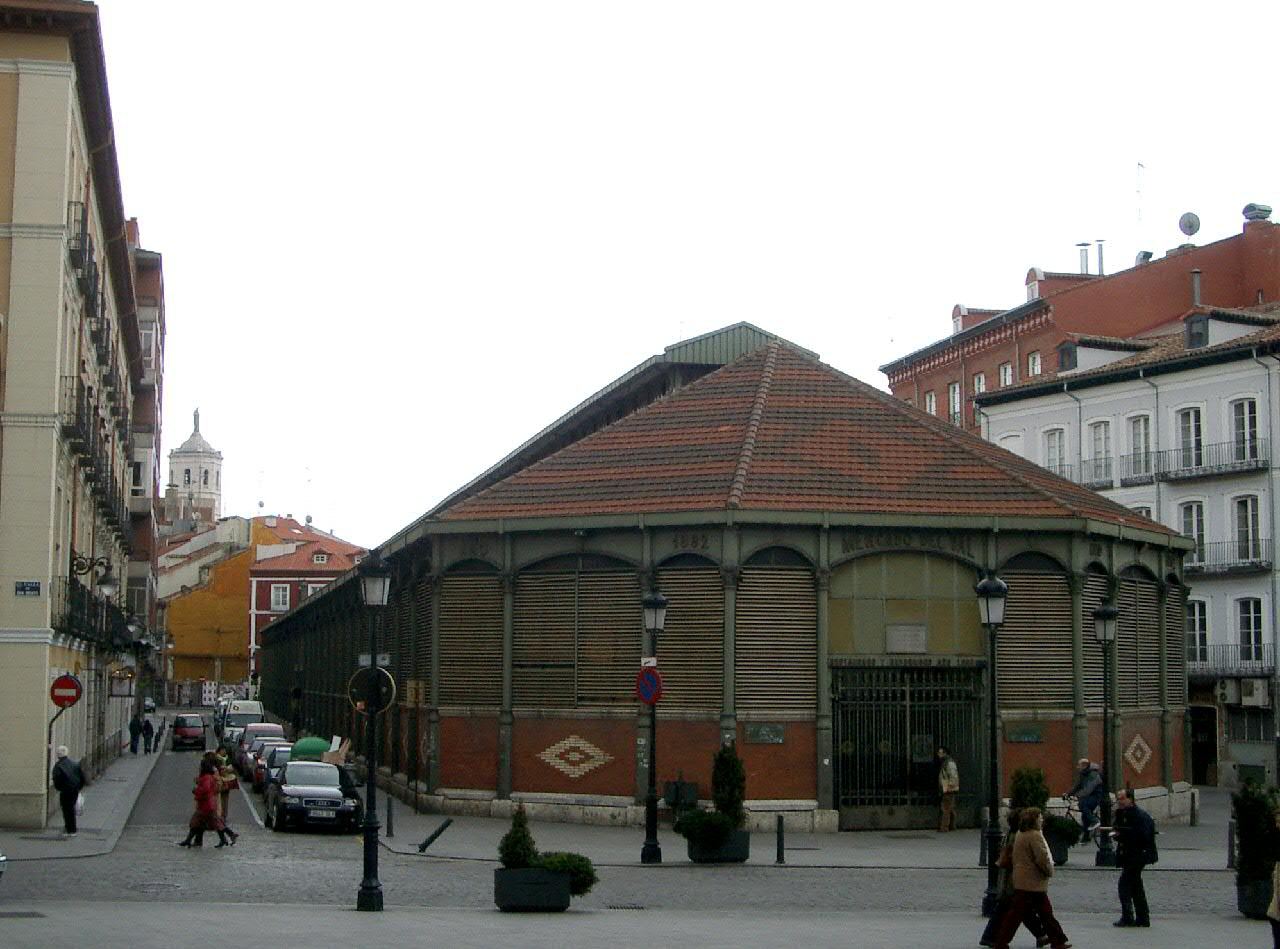 El elegante edificio del mercado del Val de Valladolid, antes de que lo destrocen con la intervención que se le cierne.